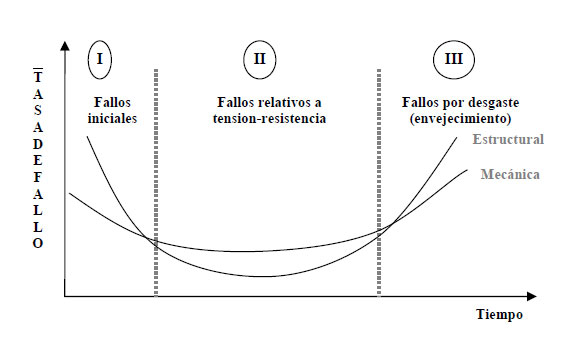 Gráfica de porbabilidad de fallos de un sistema